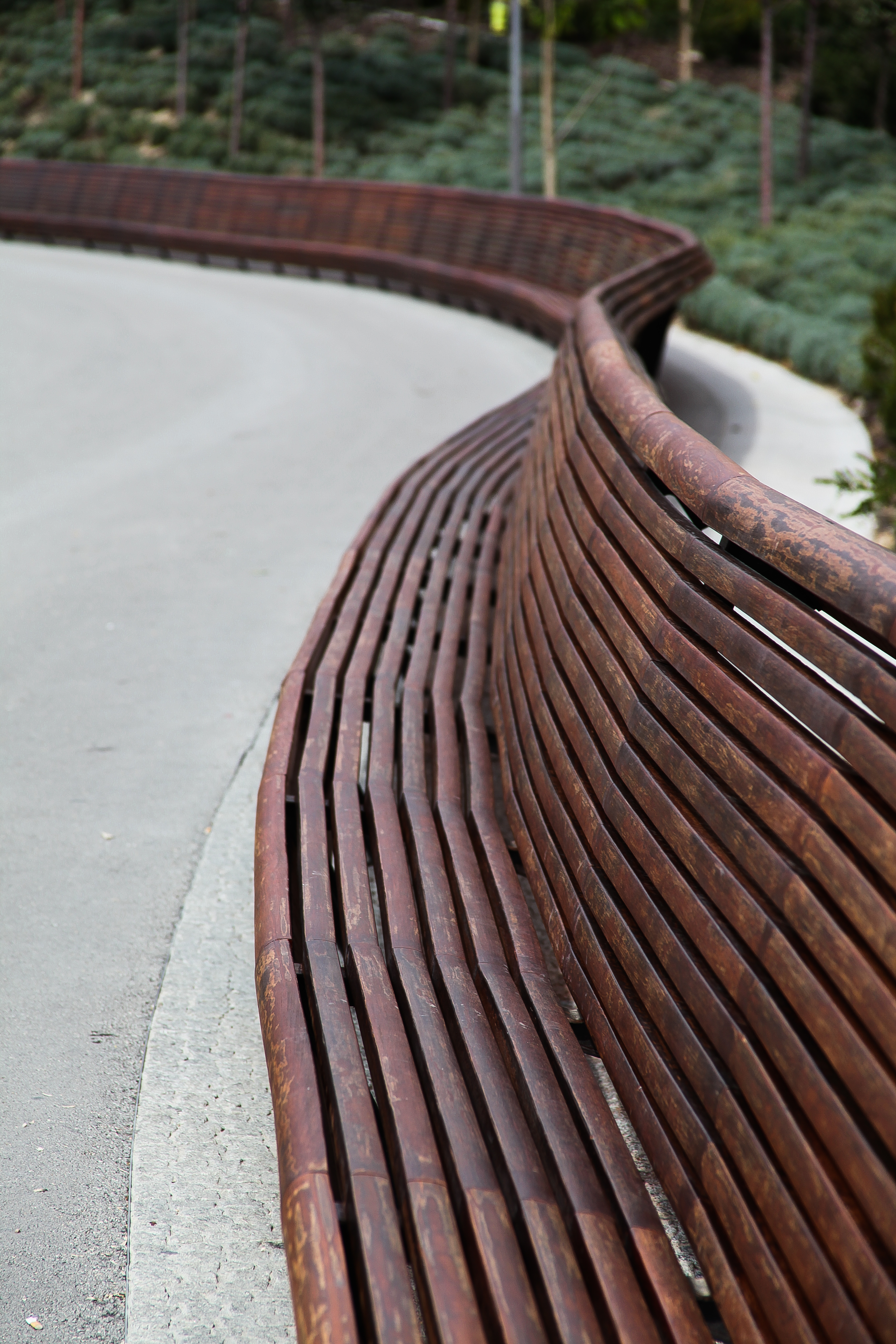 Bancos de madera de la senda ciclista-peatonal que recorre la margen derecha de Madrid Río, poco antes de llegar al Matadero desde el norte